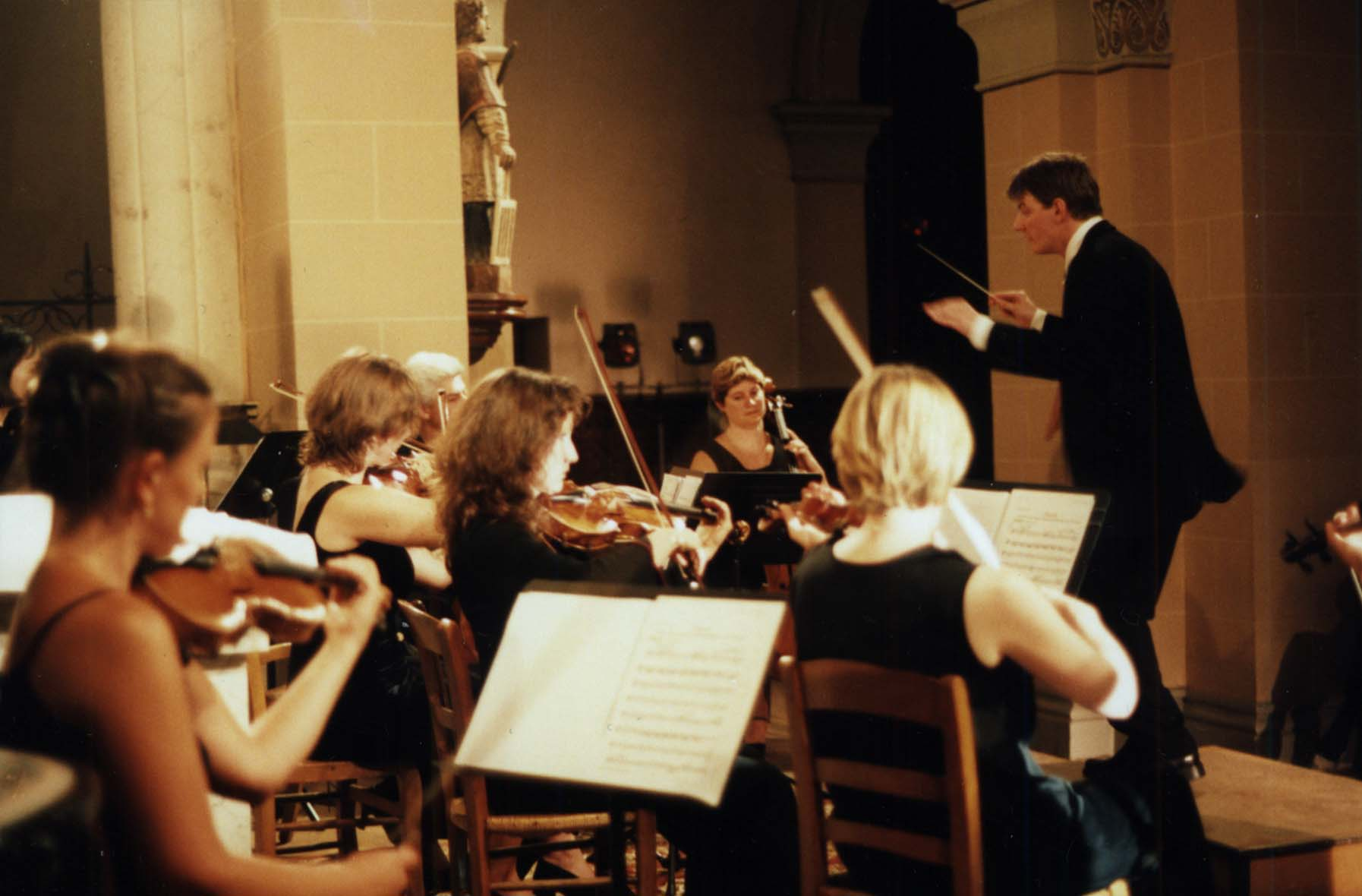 photo du Nouvel orchestre de chambre de Rouen